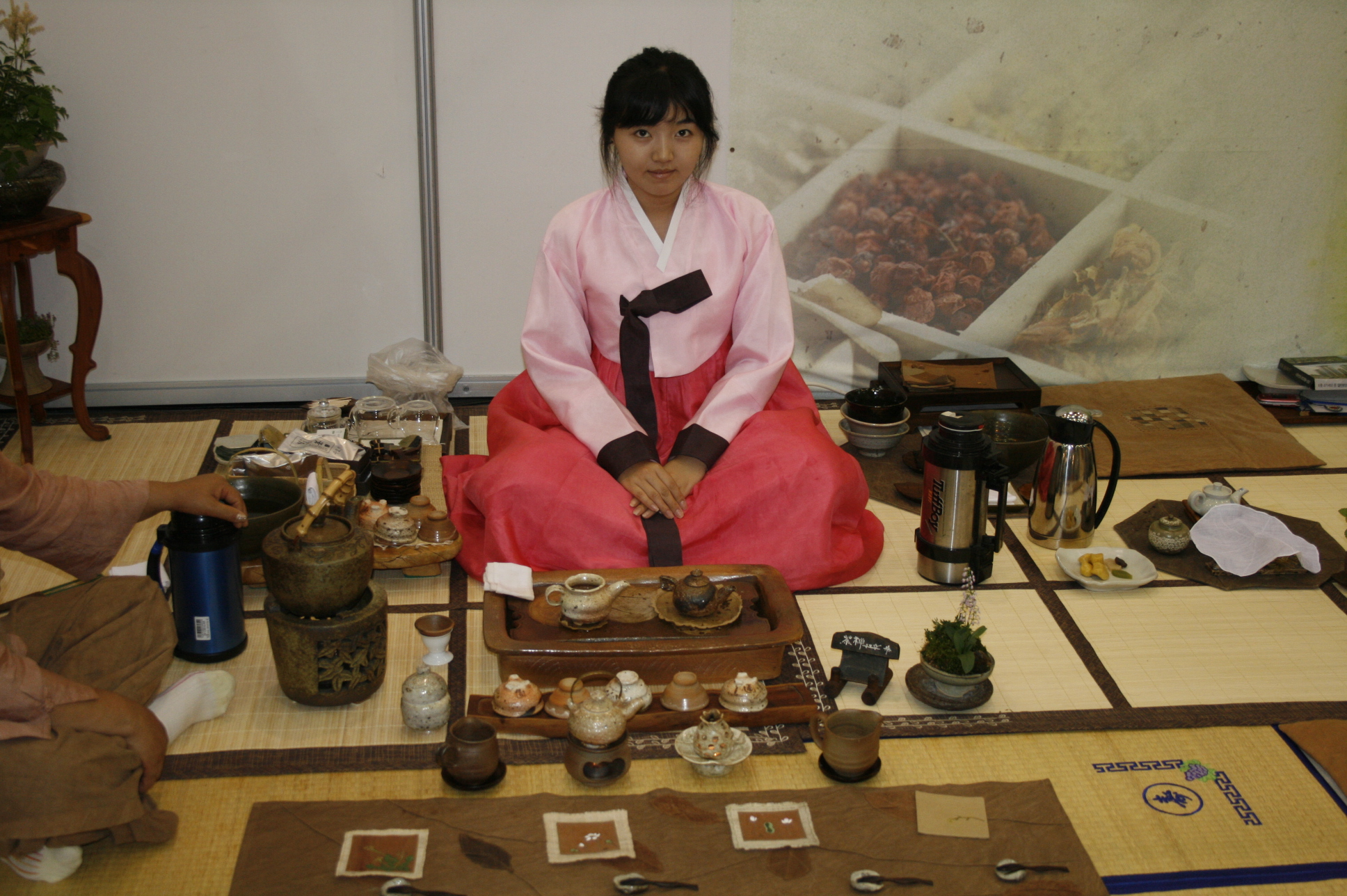 Korea